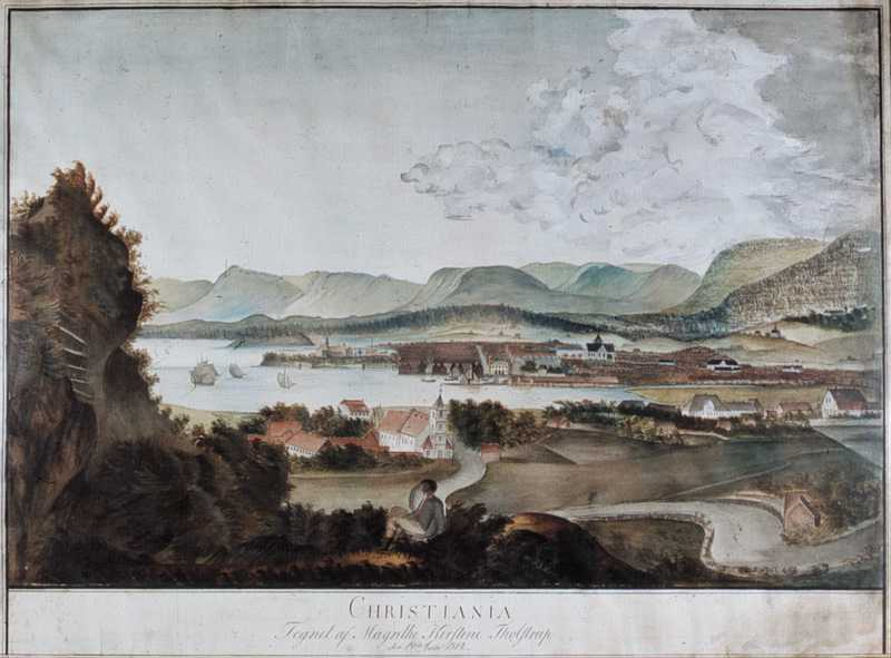 Utsikt fra Ekeberg 19. juli 1814 av Magrethe Kristine Tholstrup. Gouache. Sign/påskrift: Påtegnet i margen nederst: Christiania/Tegnet af Magrethe Kristine Tholstrup/den 19de Juli 1814. Bredde: 742 mm, høyde: 492 mm.